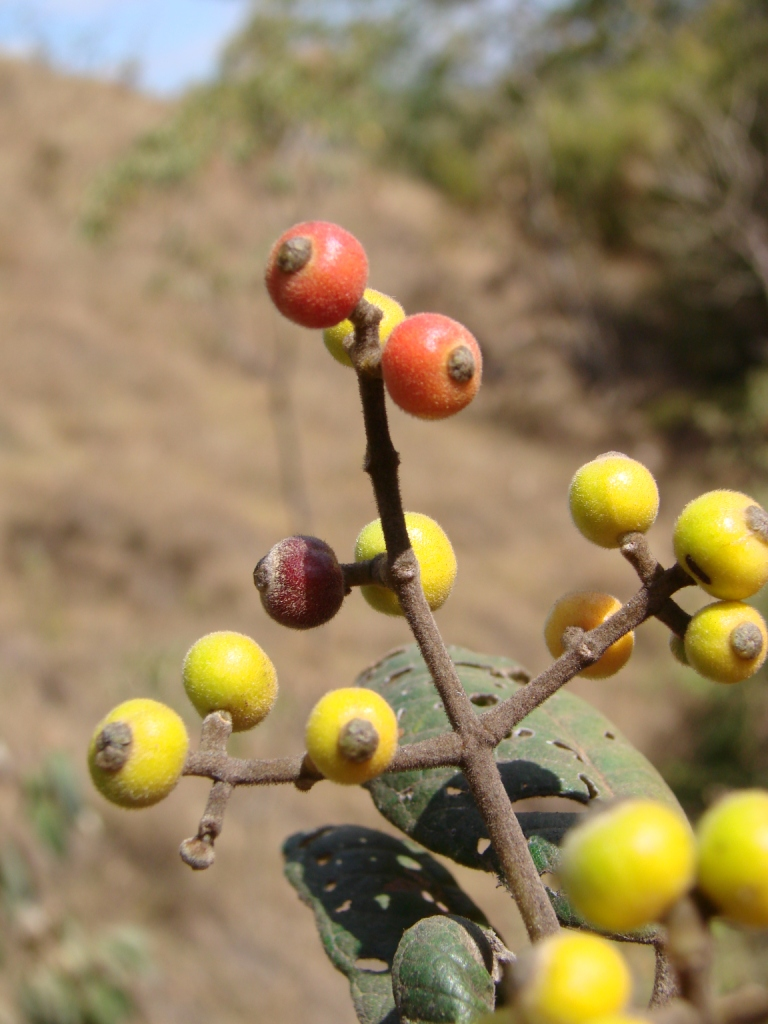 Myrcia fenzliana O. Berg - Sin. het. Gomidesia lindeniana Berg - MYRTACEAE - APA da Bacia do Rio São Bartolomeu - Brasília - Distrito Federal - Brasil.